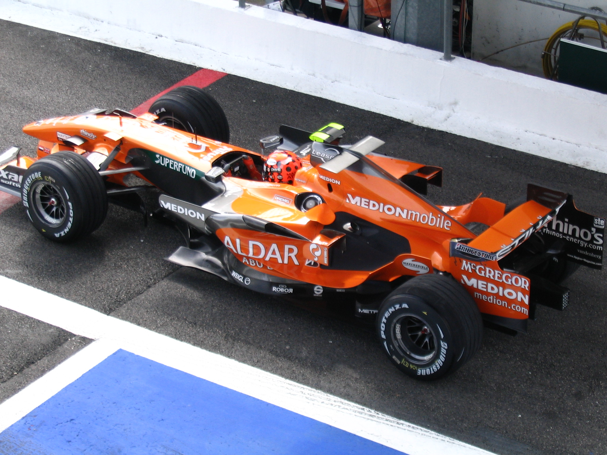 Circuit de Magny Court, Grand Prix de France